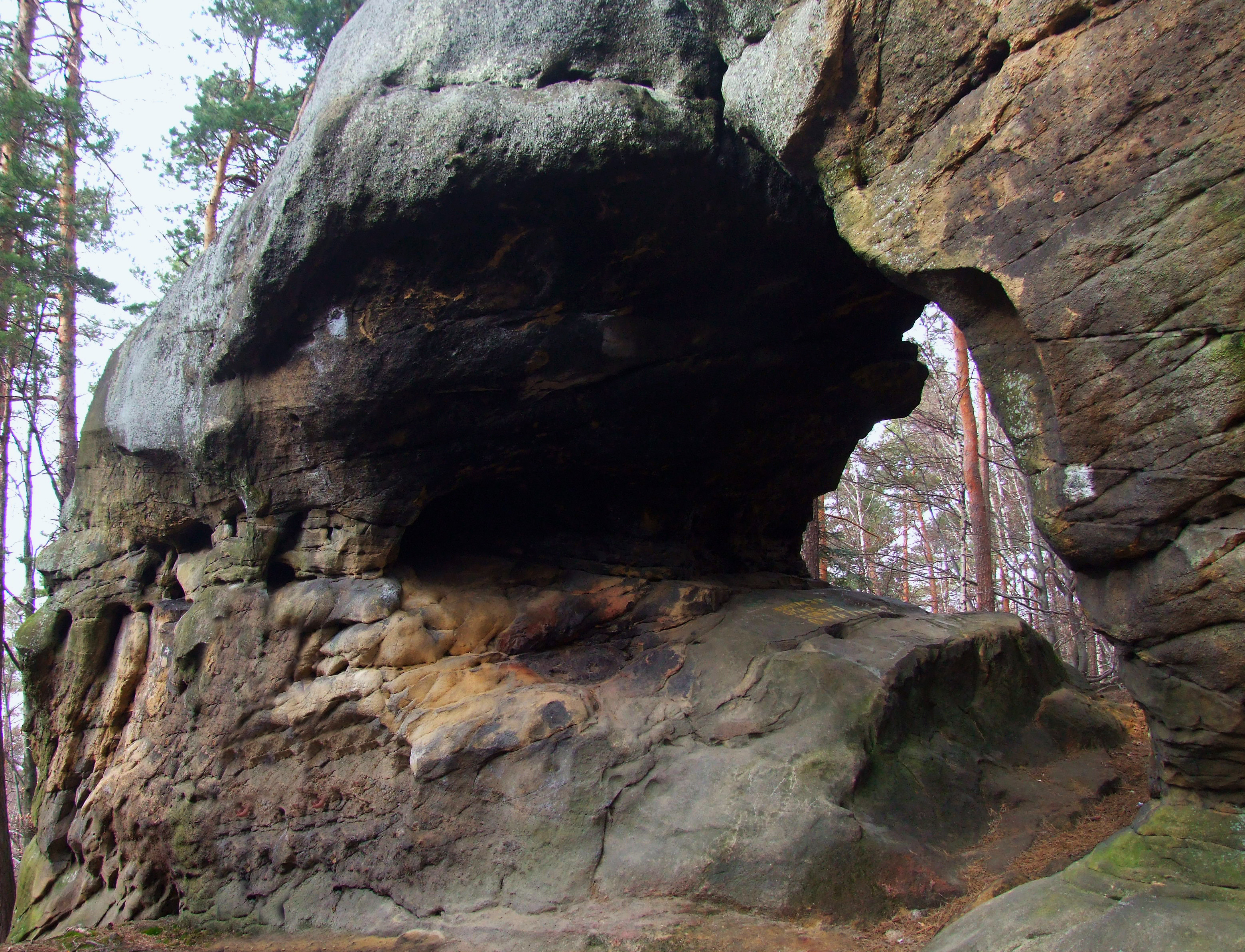 Kamienie Brodzńskiego